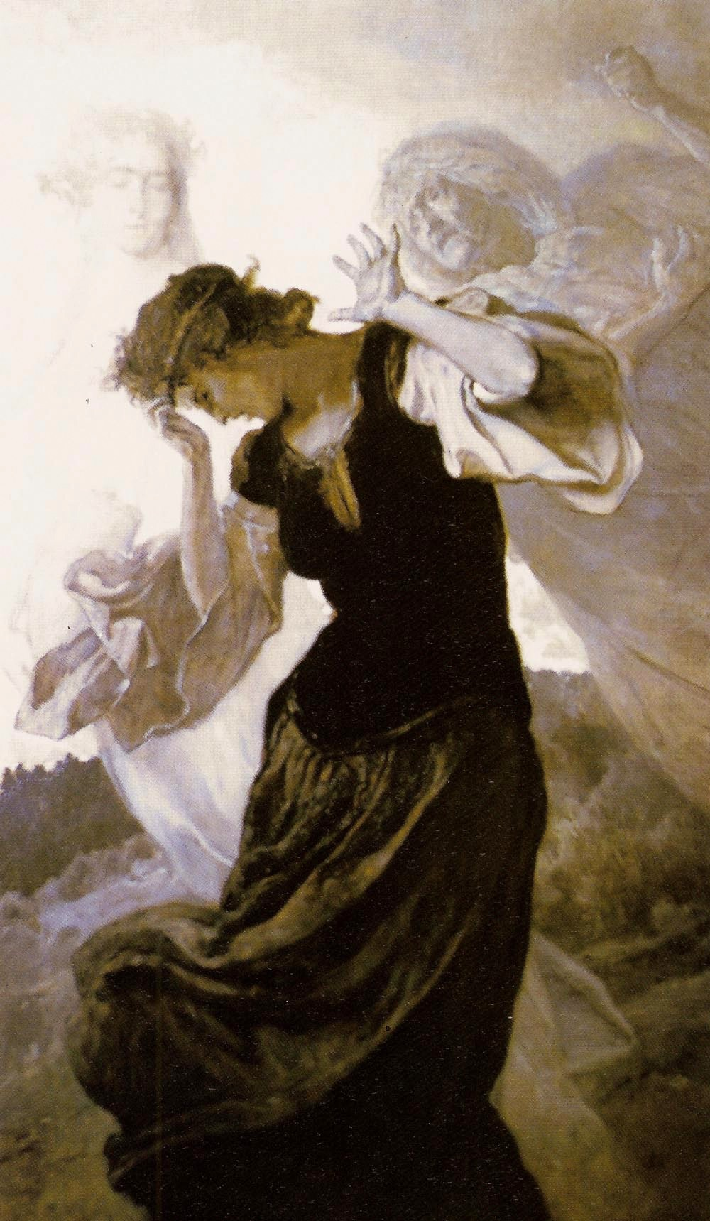 Balladyna